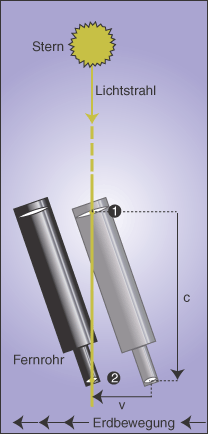 Stern mit Lichtstrahl und gekipptem Fernrohr